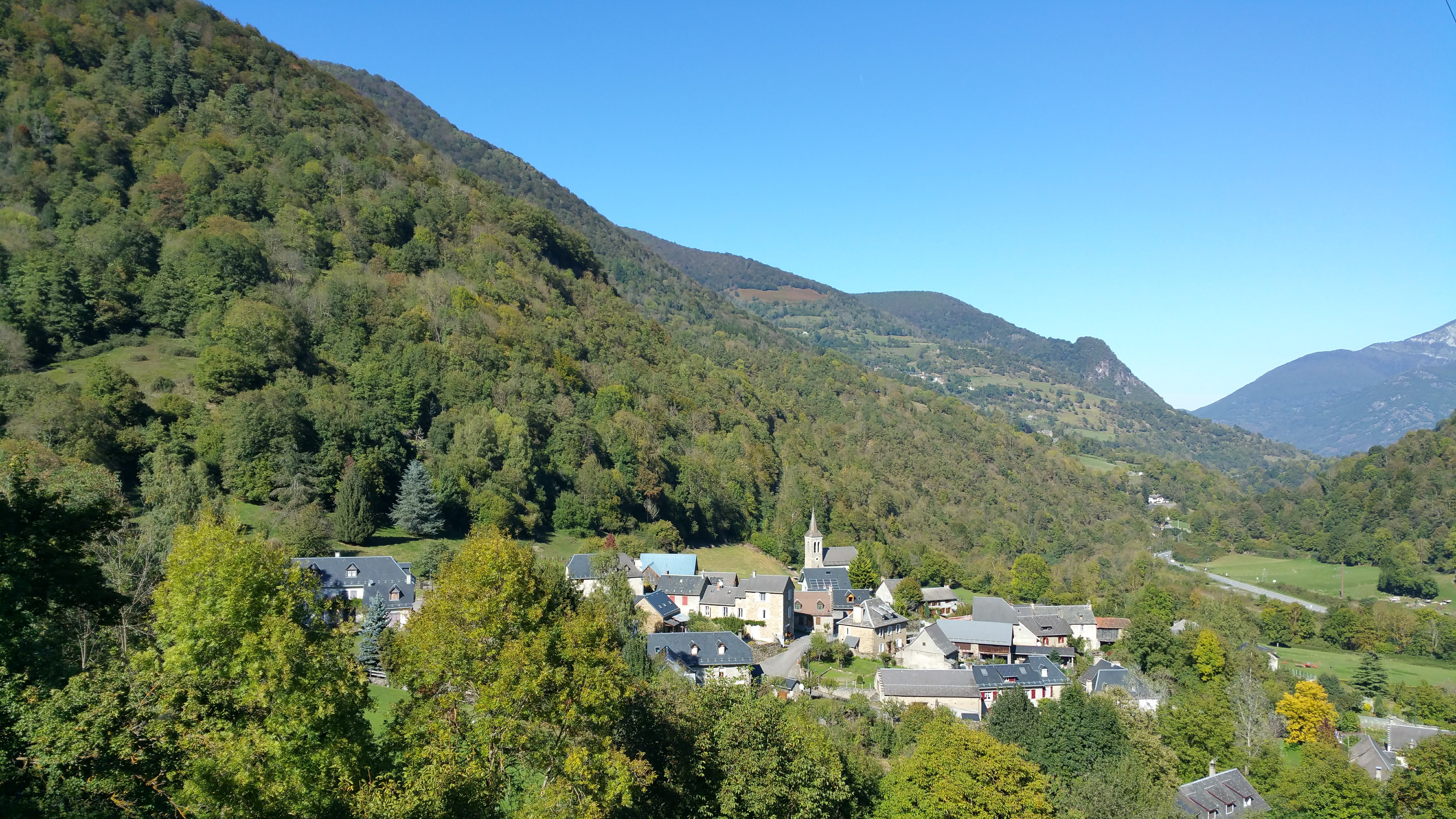 Village de Lège vu de la route menant à Cazaux du Haut